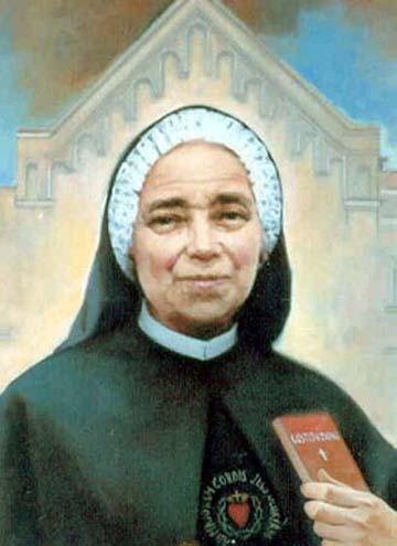 Beata Giulia Salzano, dipinto di Giuseppe Antonio Lomuscio